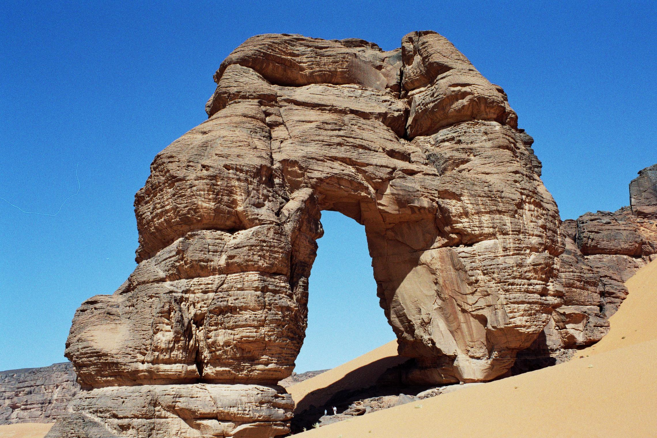 Arche de Fozzigiaren - Dans le désert Libyen d'Akakus. (région du Sahara située au sud-ouest de la Libye). Immense arche rocheuse naturelle. Les 2 petits hommes au pied de l'arche donnent une idée de l'échelle.